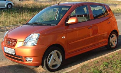 Kia Picanto